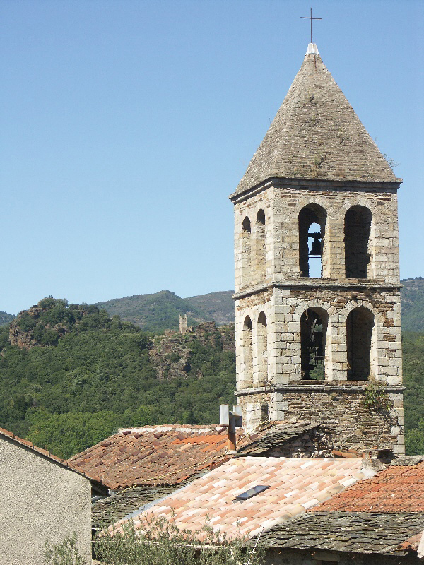 Saint-Gervais-sur-Mare (Hérault) - église paroissiale Saint-Gervais et Saint-Protais. À l'arrière-plan, le clocher de Saint-Pierre-de-Neyran.